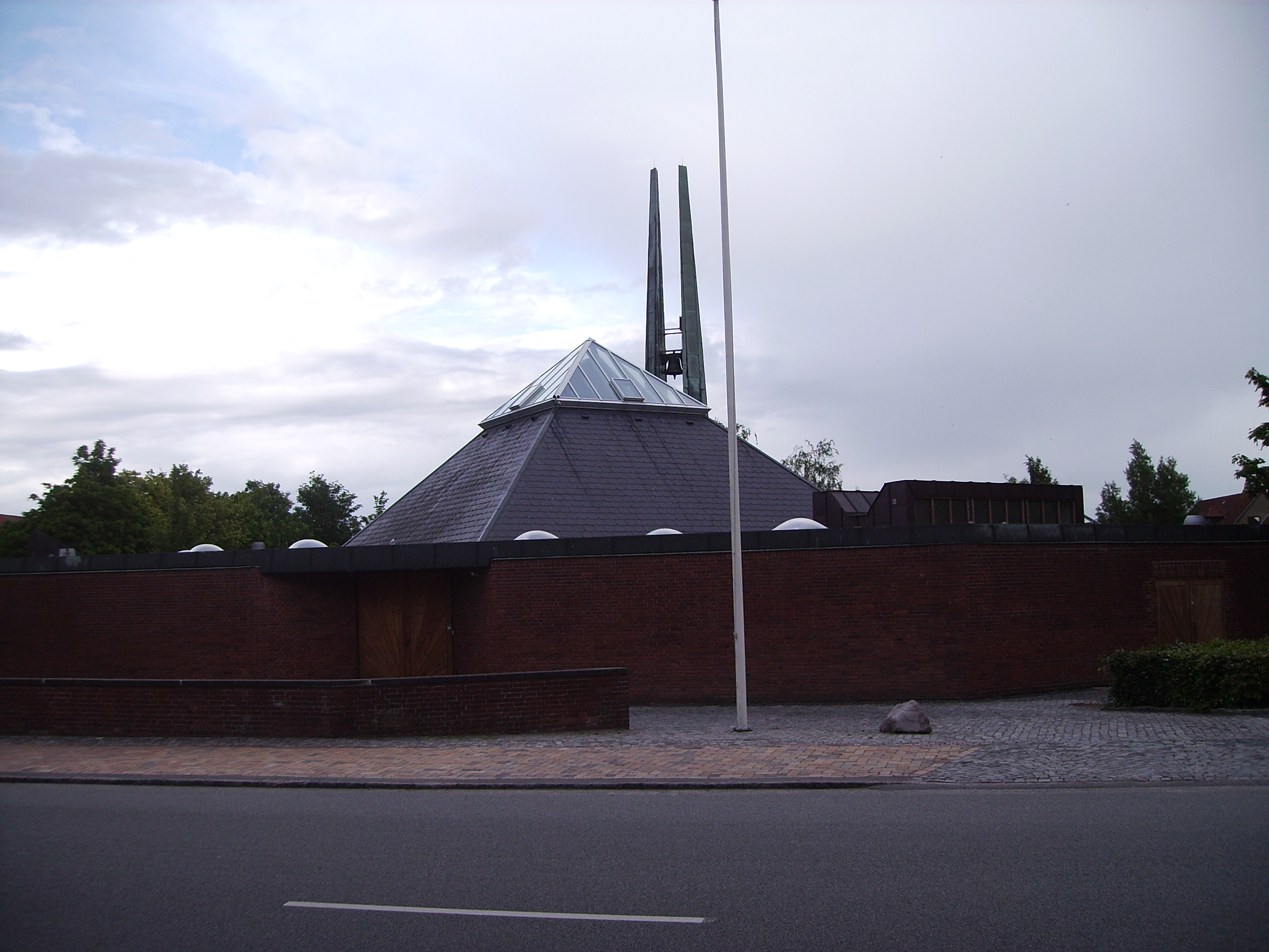 Bolbro Kirke, Bolbro Sogn, Odense Herred, Odense Amt, Denmark (Danish Church) Date: 31.05.2006 Photographed by Søren Møller